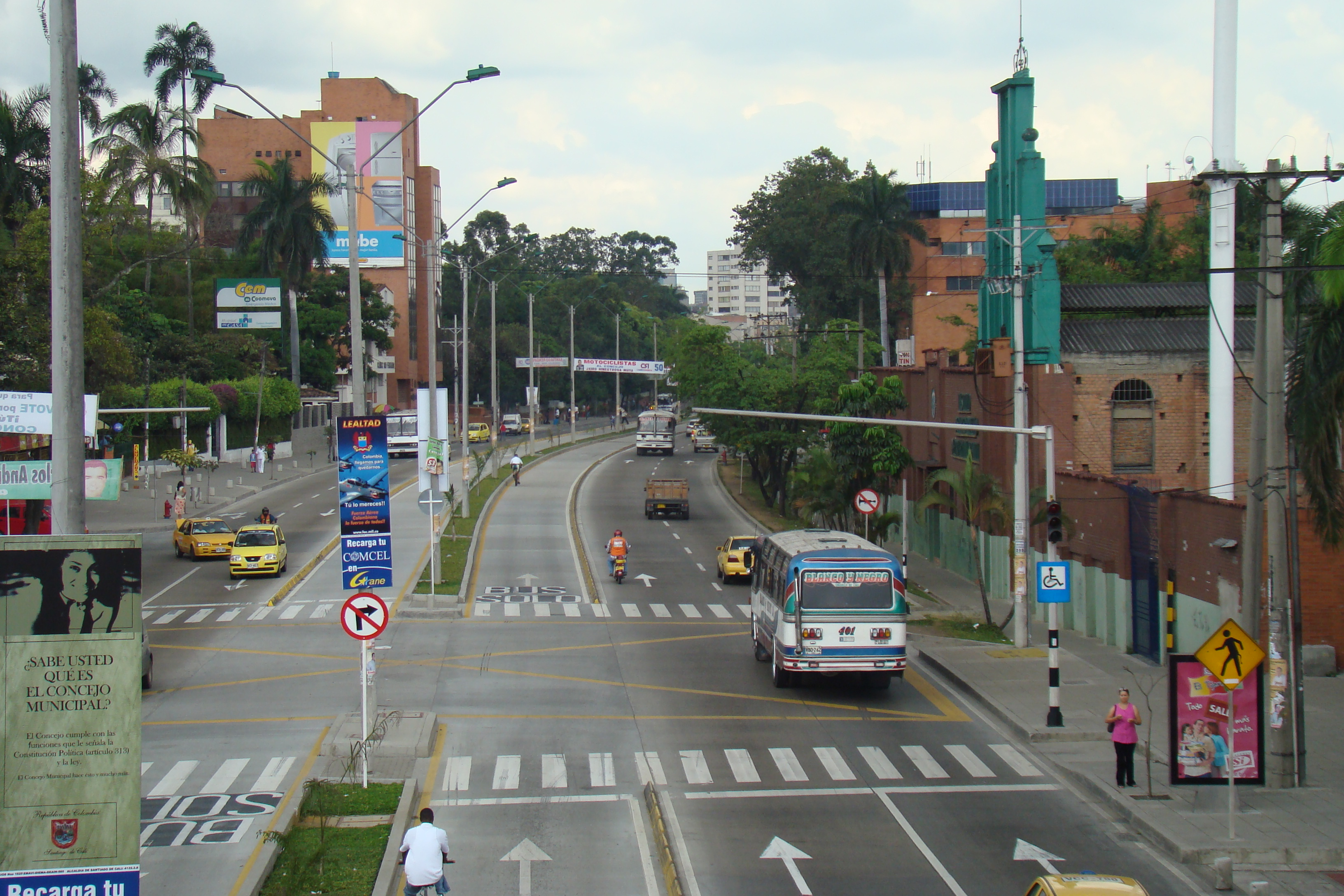 Calle 5ta, MIO.